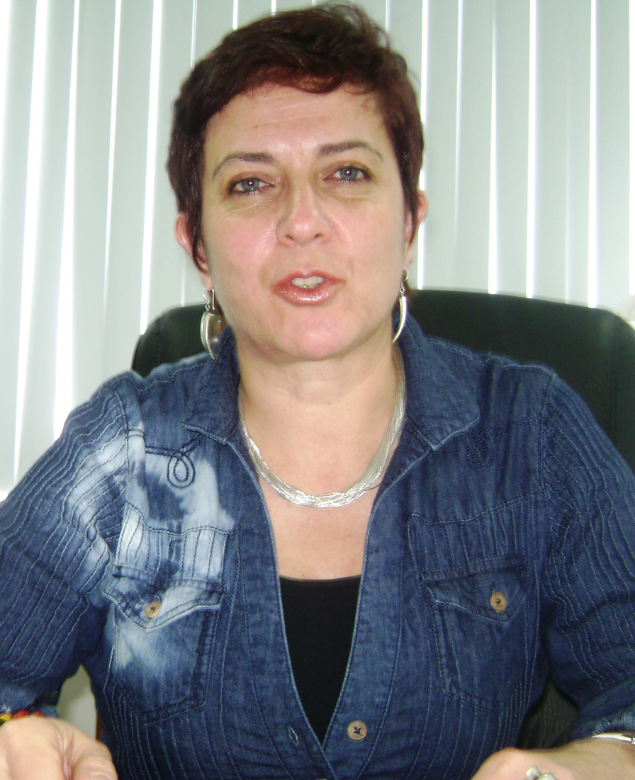 Fotografía durante una entrevista realizada por Leonardo Intriago Solórzano